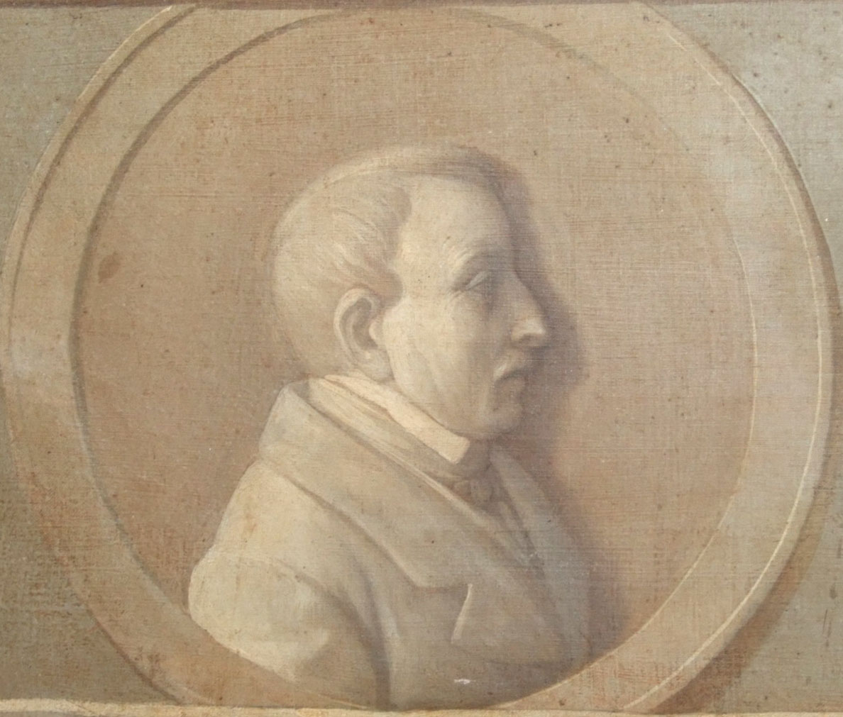 Particolare di un quadro di Antonio Bianchini dove è ritratto Camillo Jacobini. Il quadro si trova nel palazzo Jacobini.